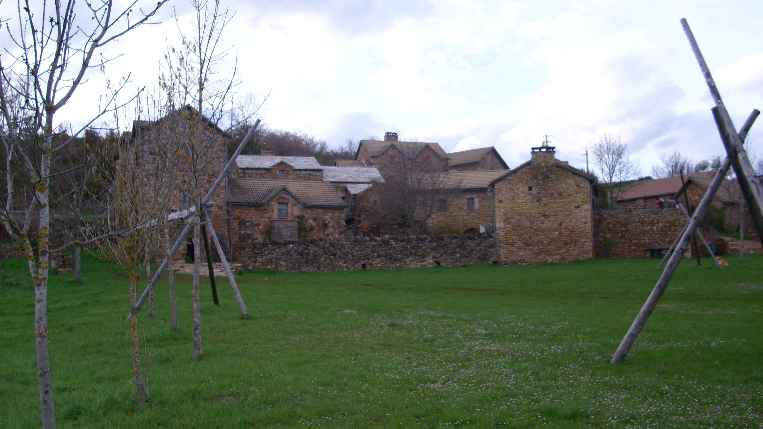 Hameau de Bécours